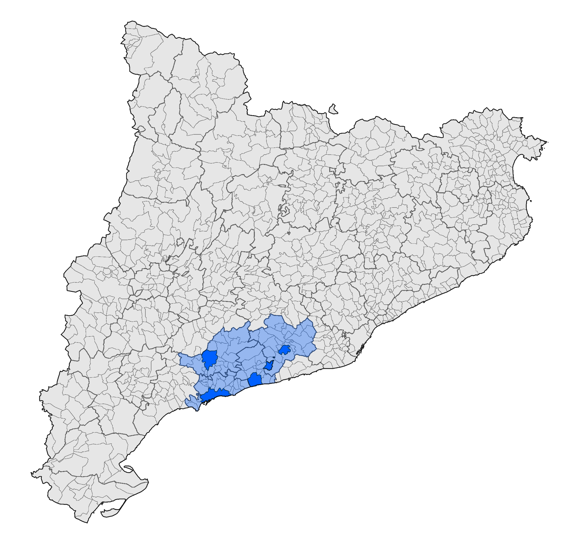 Mapa de les poblacions de les sis colles castelleres participants en el III Gran Trofeu Jorba-Preciados, celebrat el 25 de setembre de 1966 a l'avinguda del Portal de l'Àngel de Barcelona, i que aleshores eren les úniques colles existents. Els municipis pintats de blau fosc són: L'Arboç i El Vendrell (Baix Penedès), Tarragona (Tarragonès), Valls (Alt Camp) i Vilafranca del Penedès (Alt Penedès). Les colles participants al concurs de castells, per ordre de classificació, van ser: la Colla Vella dels Xiquets de Valls, els Nens del Vendrell, la Colla Vella dels Xiquets de Tarragona, els Castellers de Vilafranca, la Colla Nova dels Xiquets de Tarragona i els Minyons de l'Arboç.